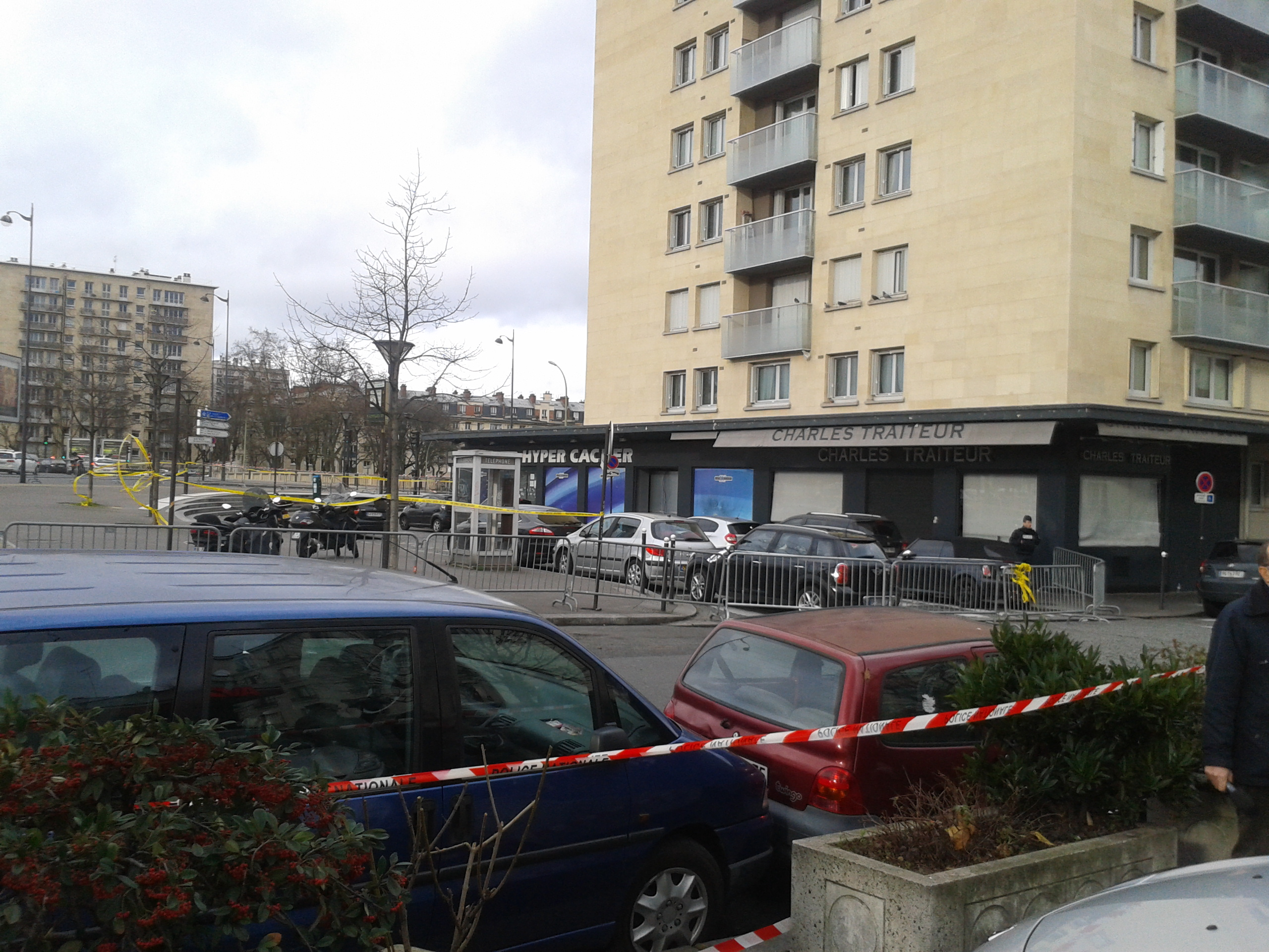 Le magasin Hyper Cacher, porte de Vincennes à Paris, au lendemain de la prise d'otages.